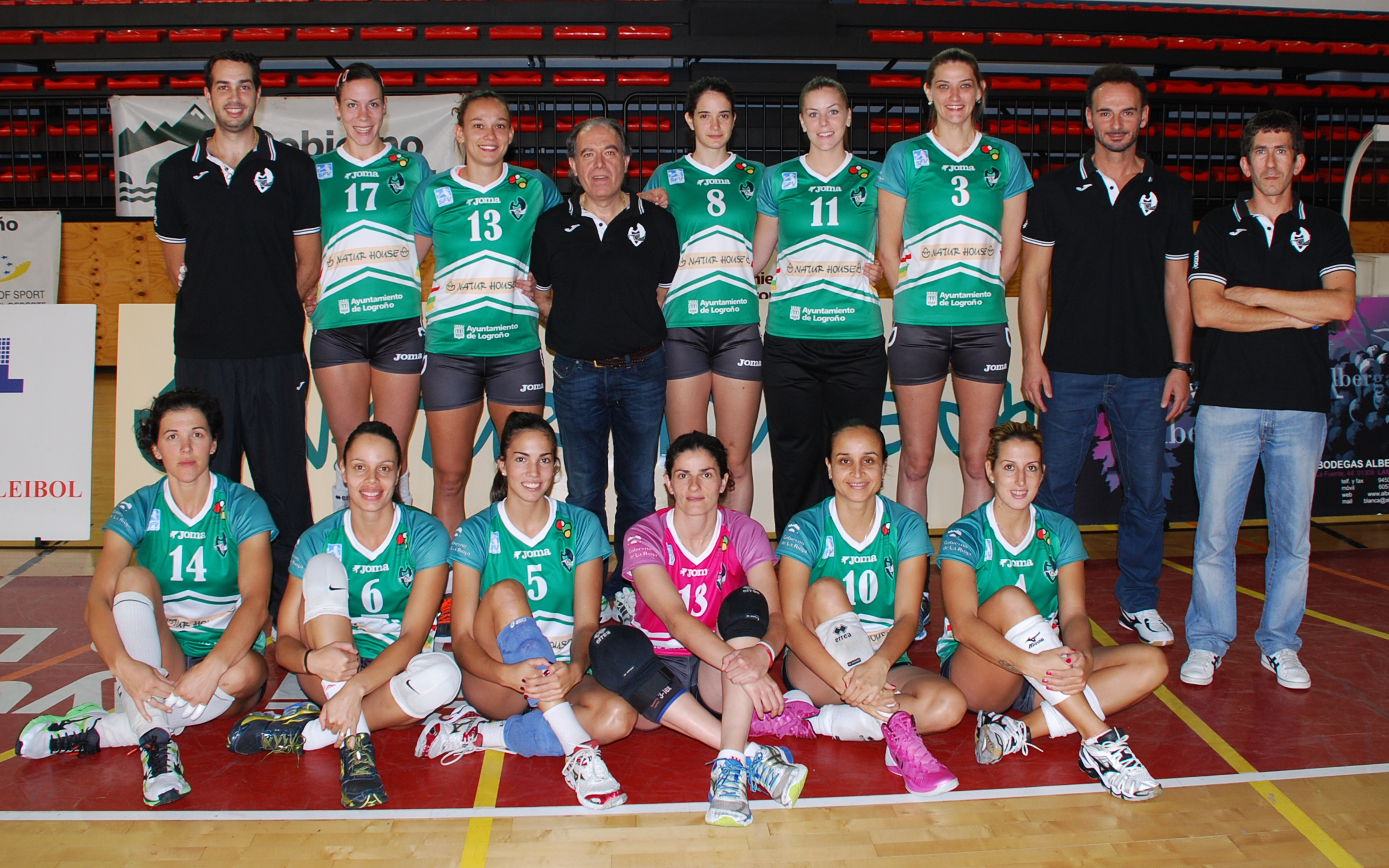 Naturhouse Ciudad de Logroño - temporada 2014-2015, equipo profesional español de voleibol femenino.